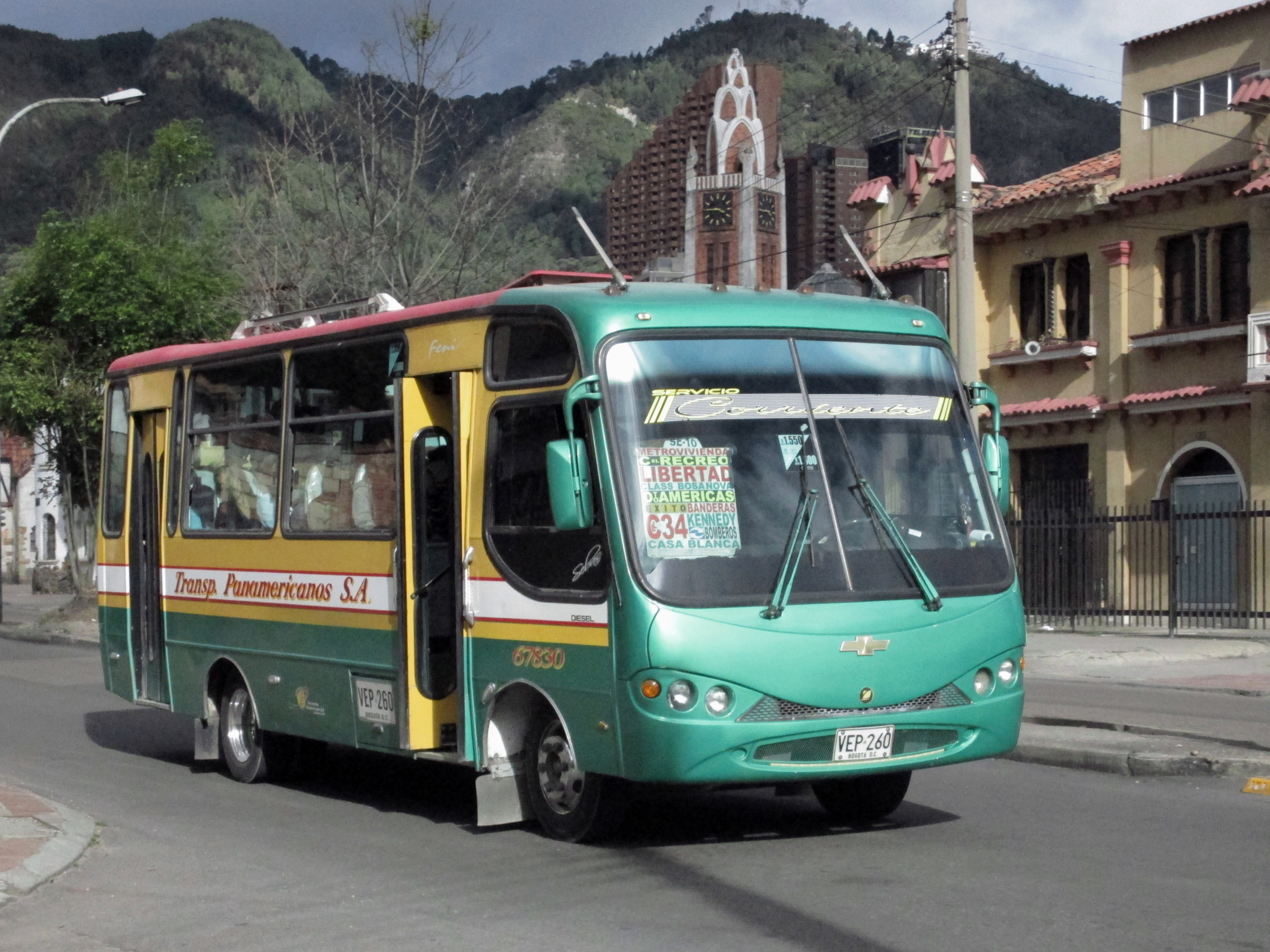 Bogotá